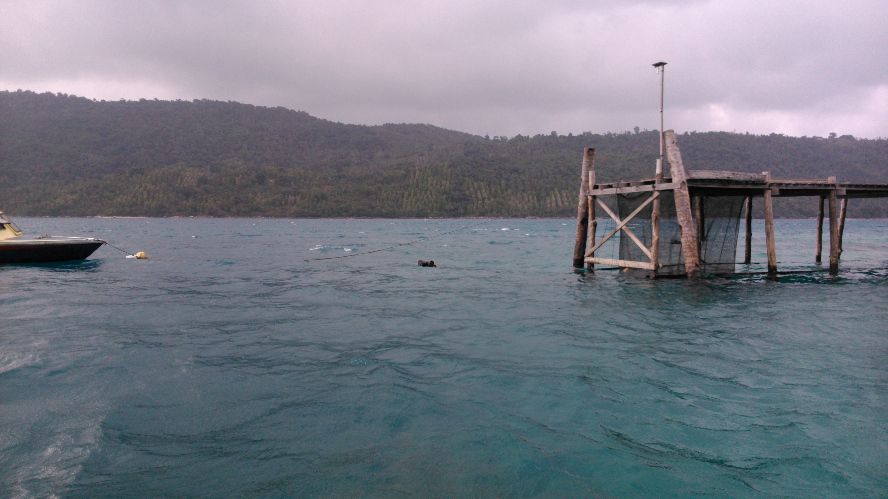 Dermaga matak kecil, kabupaten kepulauan anambas